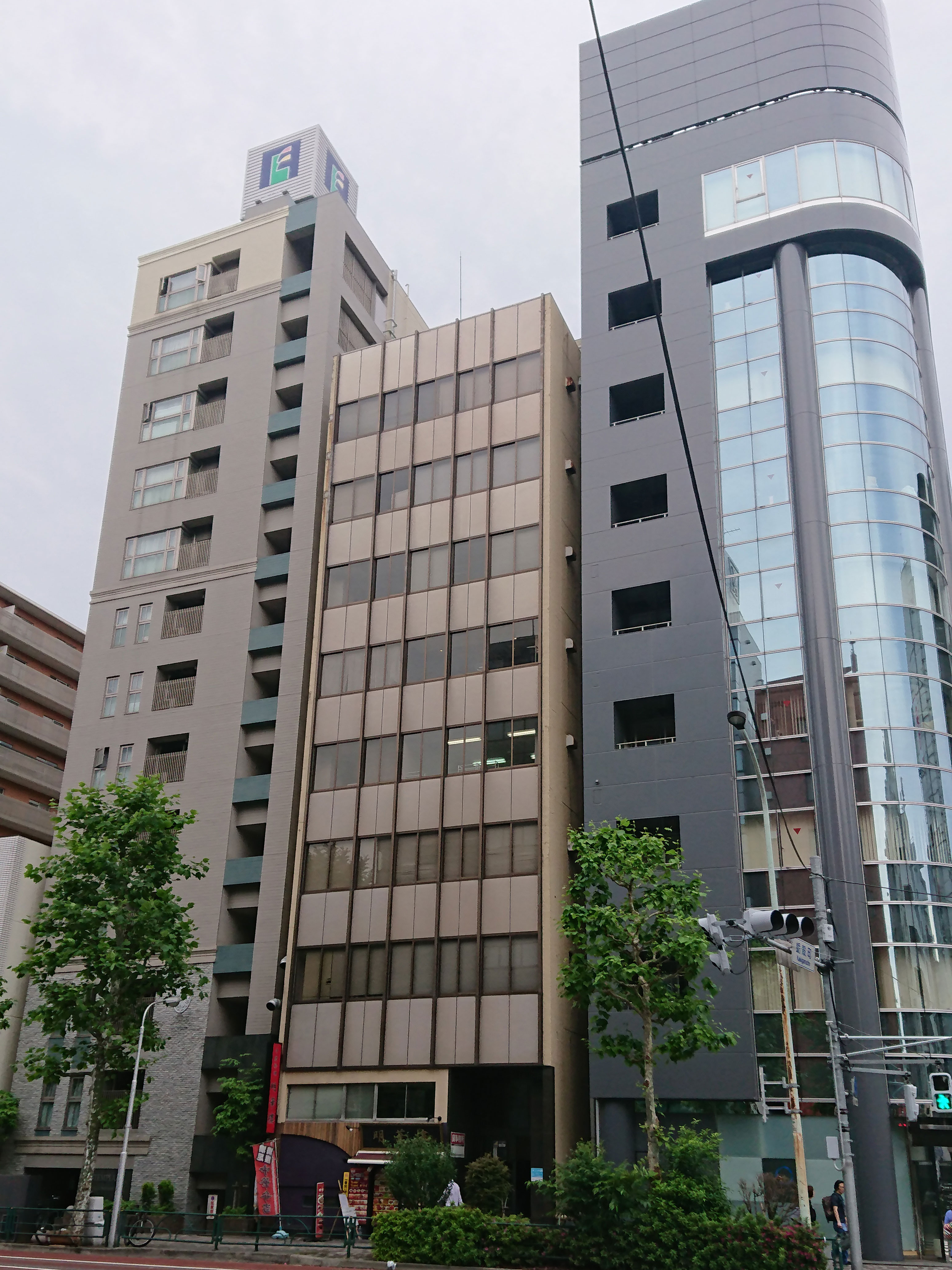 The headquarter building of National Party of Japan